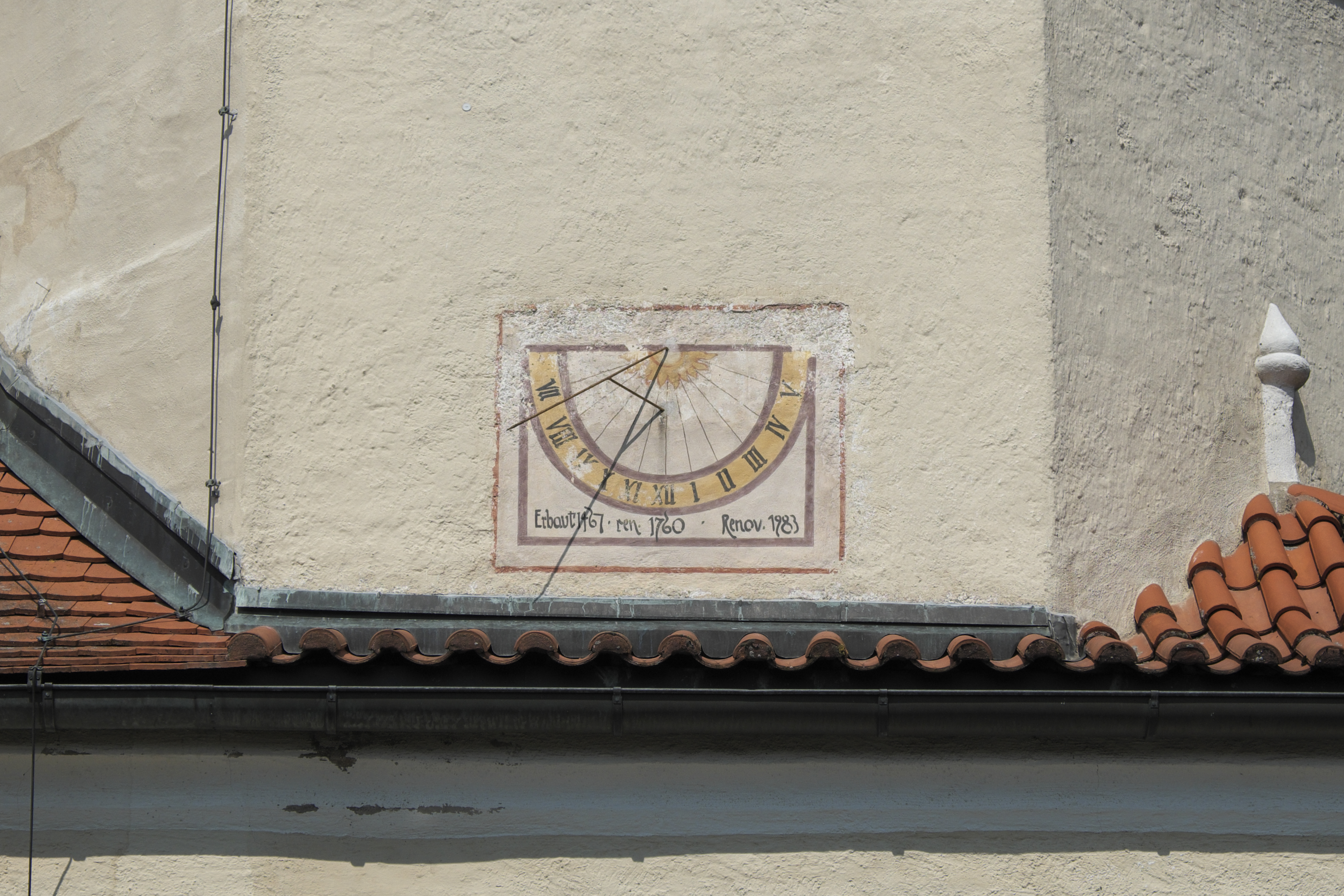 Alte katholische Pfarrkirche St. Georg in Oberpfaffenhofen (Weßling) im Landkreis Starnberg (Bayern, Deutschland), Sonnenuhr am Glockenturm